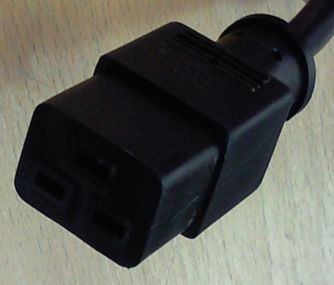 Connettore Volante Femmina IEC 60320-C19